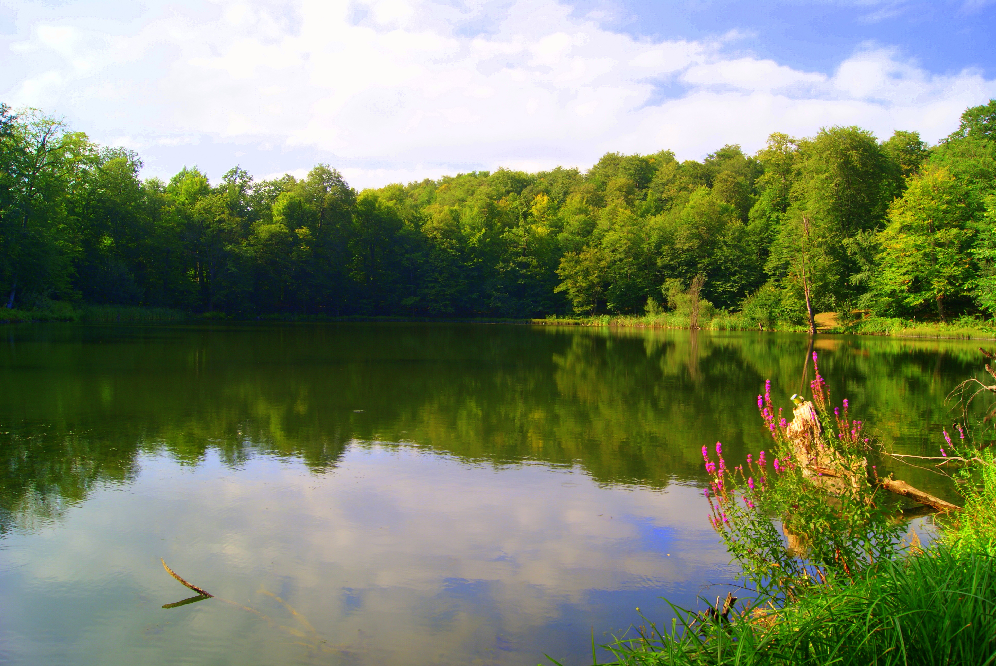 Գոշ լիճ, Դիլիջան, Տավուշ